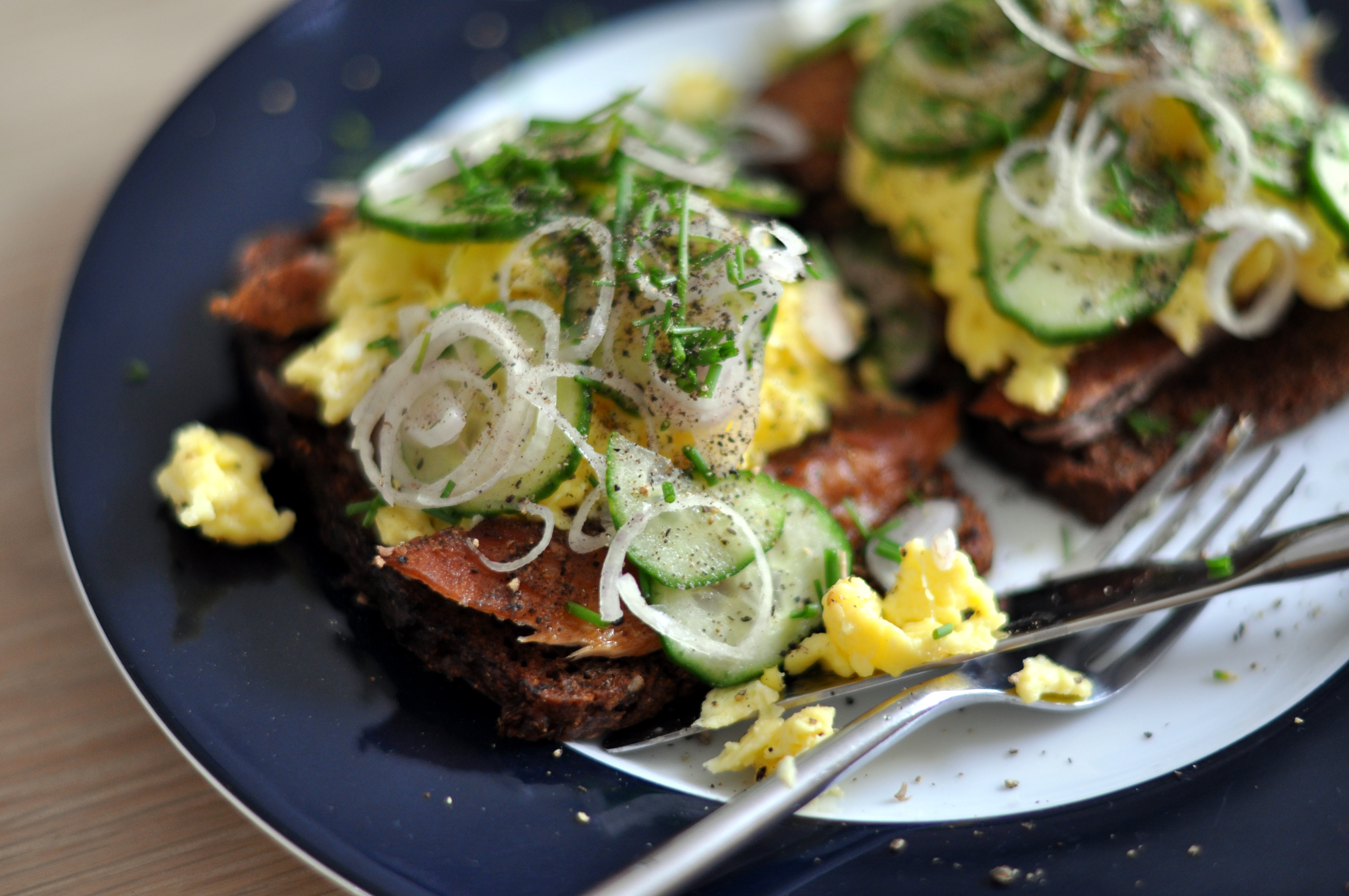 Rugbrød med røget makrel og røræg